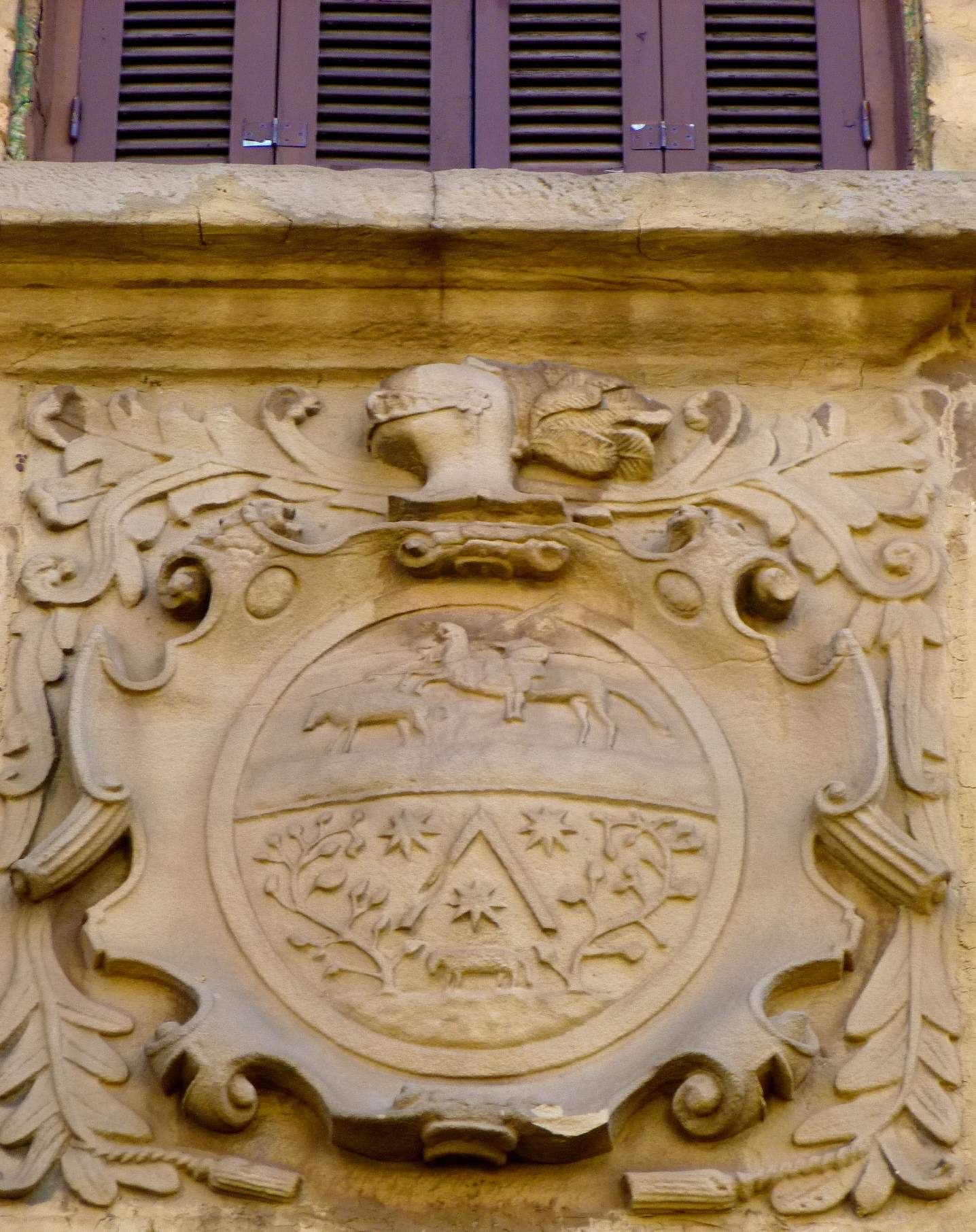 Jamot Enea (Lezo, Guipúzcoa)